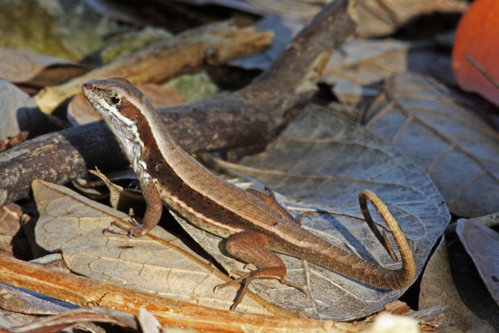 Playa Maguana, Guantanamo.